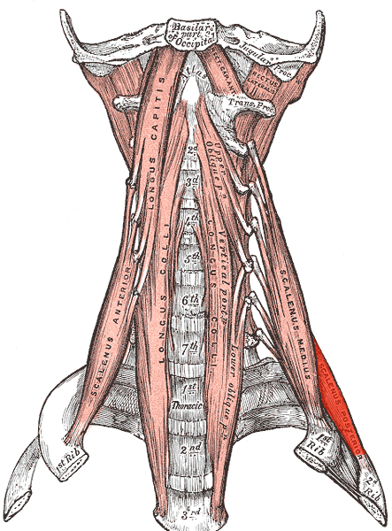 Scalenus posterior muscle